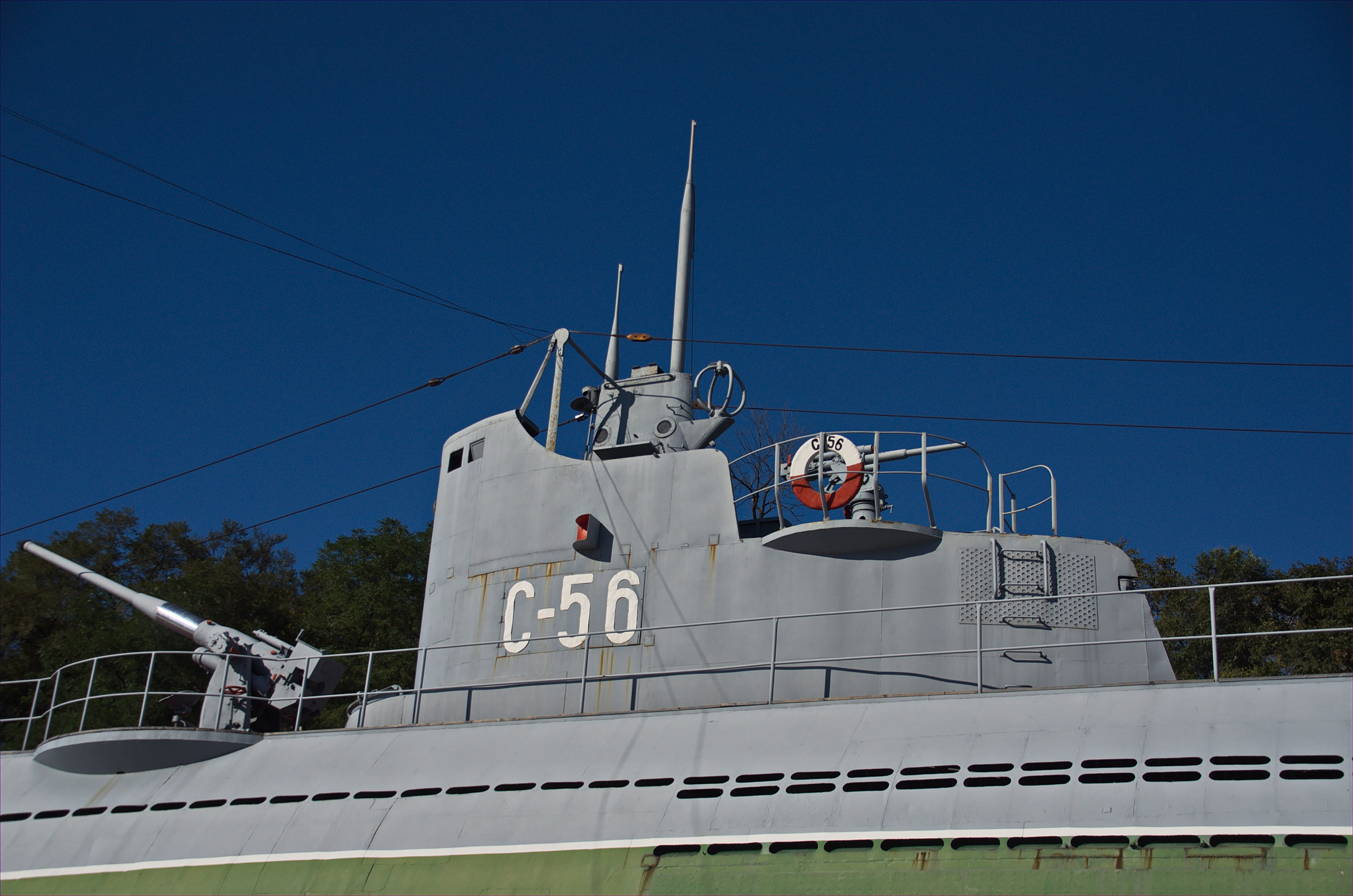 058 - Wladiwostok 2015